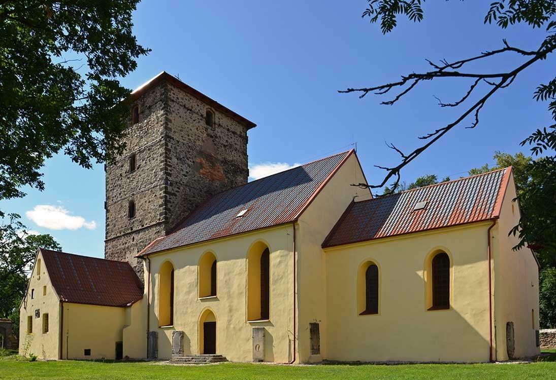 Kościół filialny św. Marii Dominiki Mazzarello